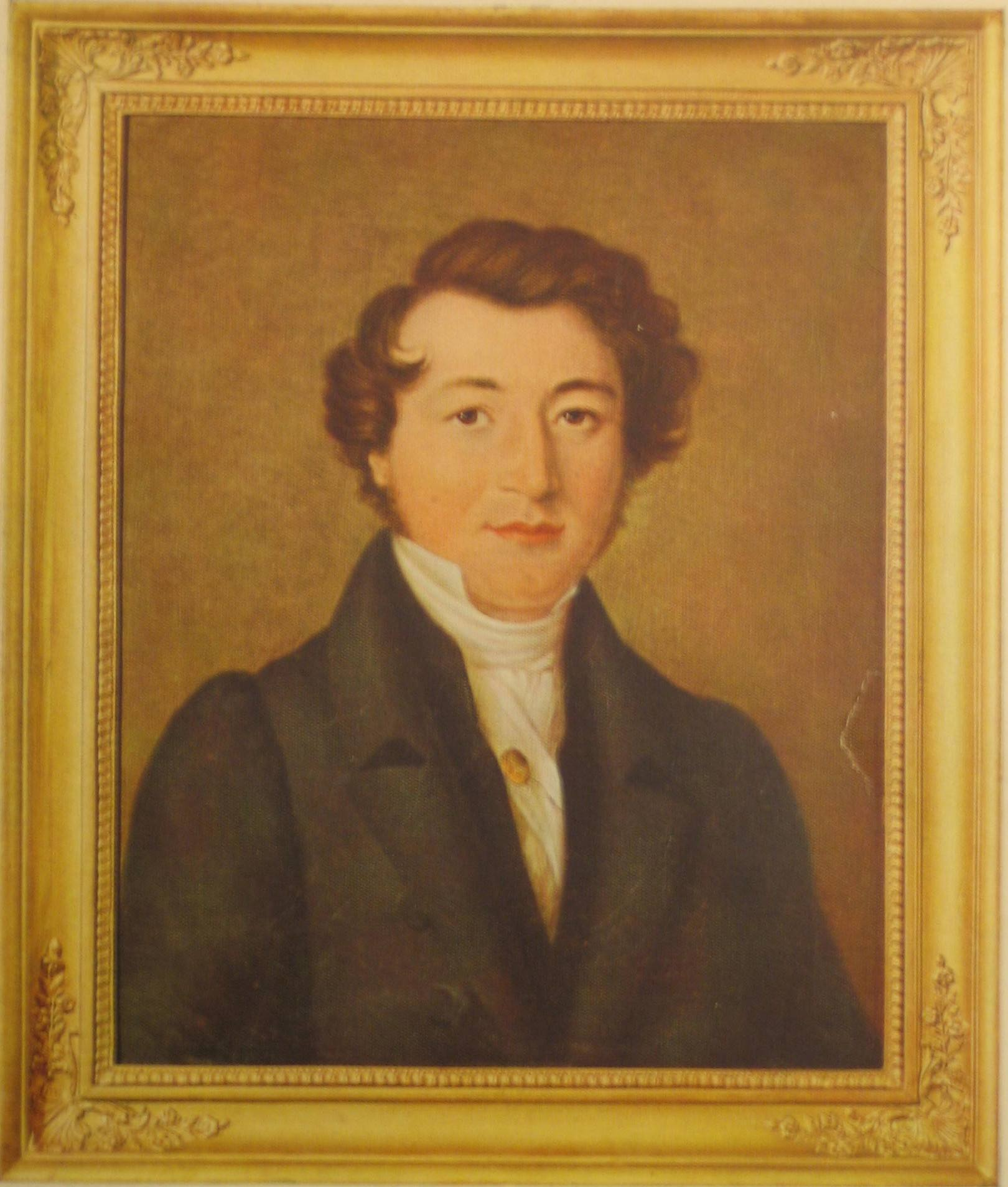 Christia Friedrich Ludwig Buschmann, Musikinstrumentenmacher, Ölgemälde von Cornelius Suhr, Hamburg